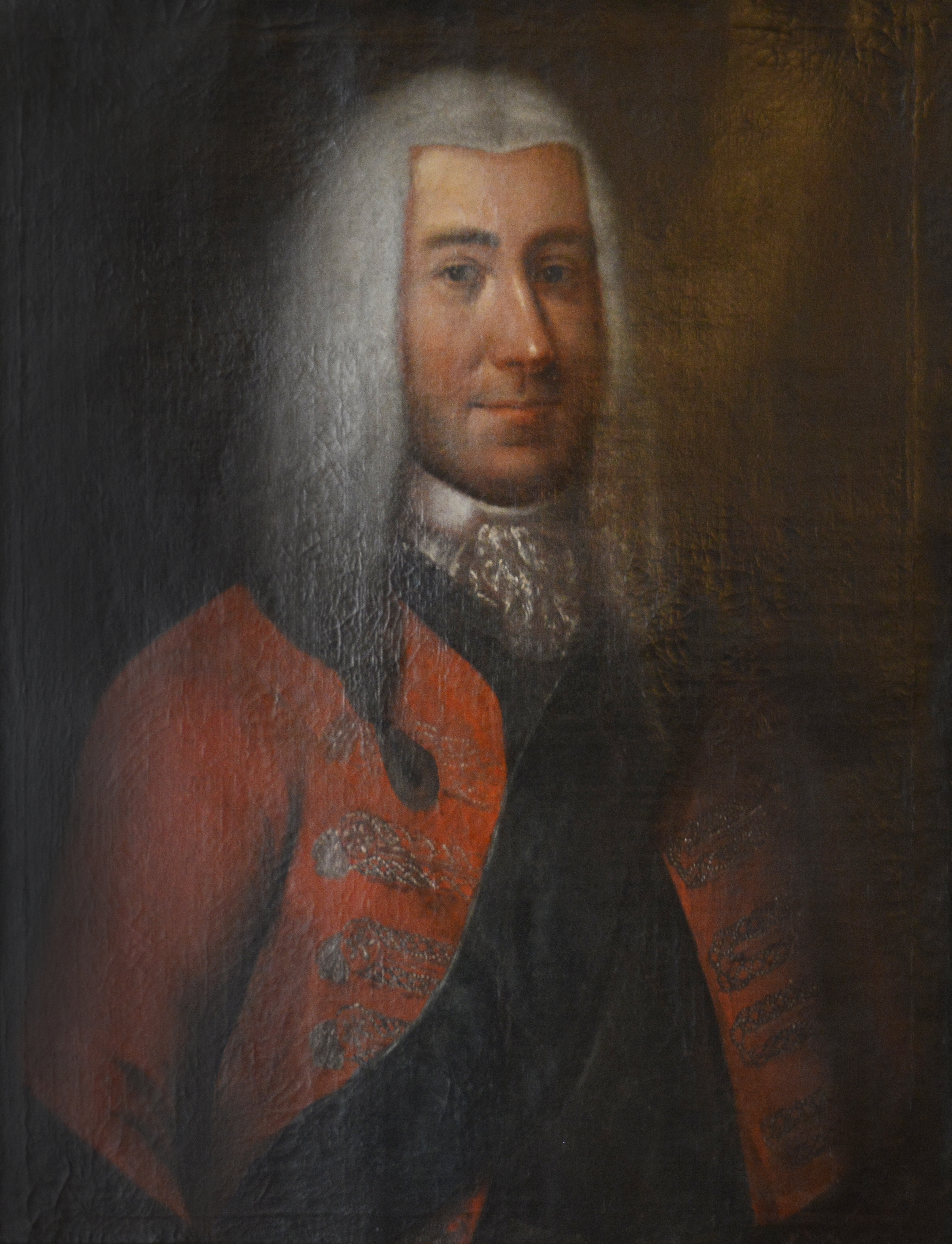 Major General Johan Arnold (1638-1709). Painting at Borgestad Manor, Skien, Norway